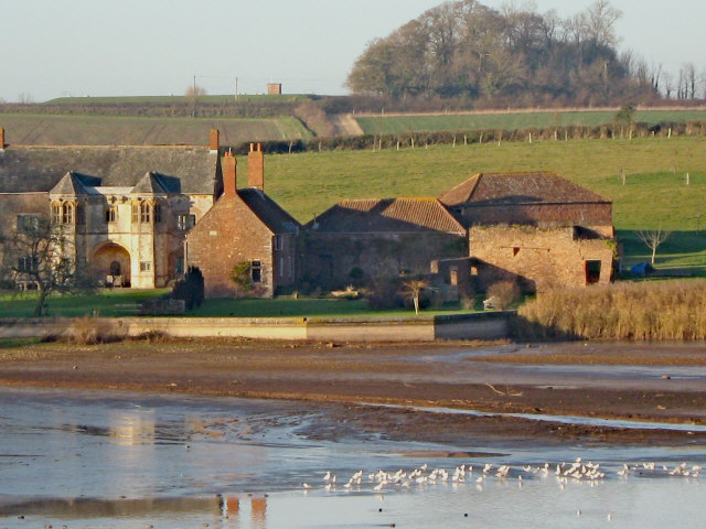 West Bower Manor, Durleigh